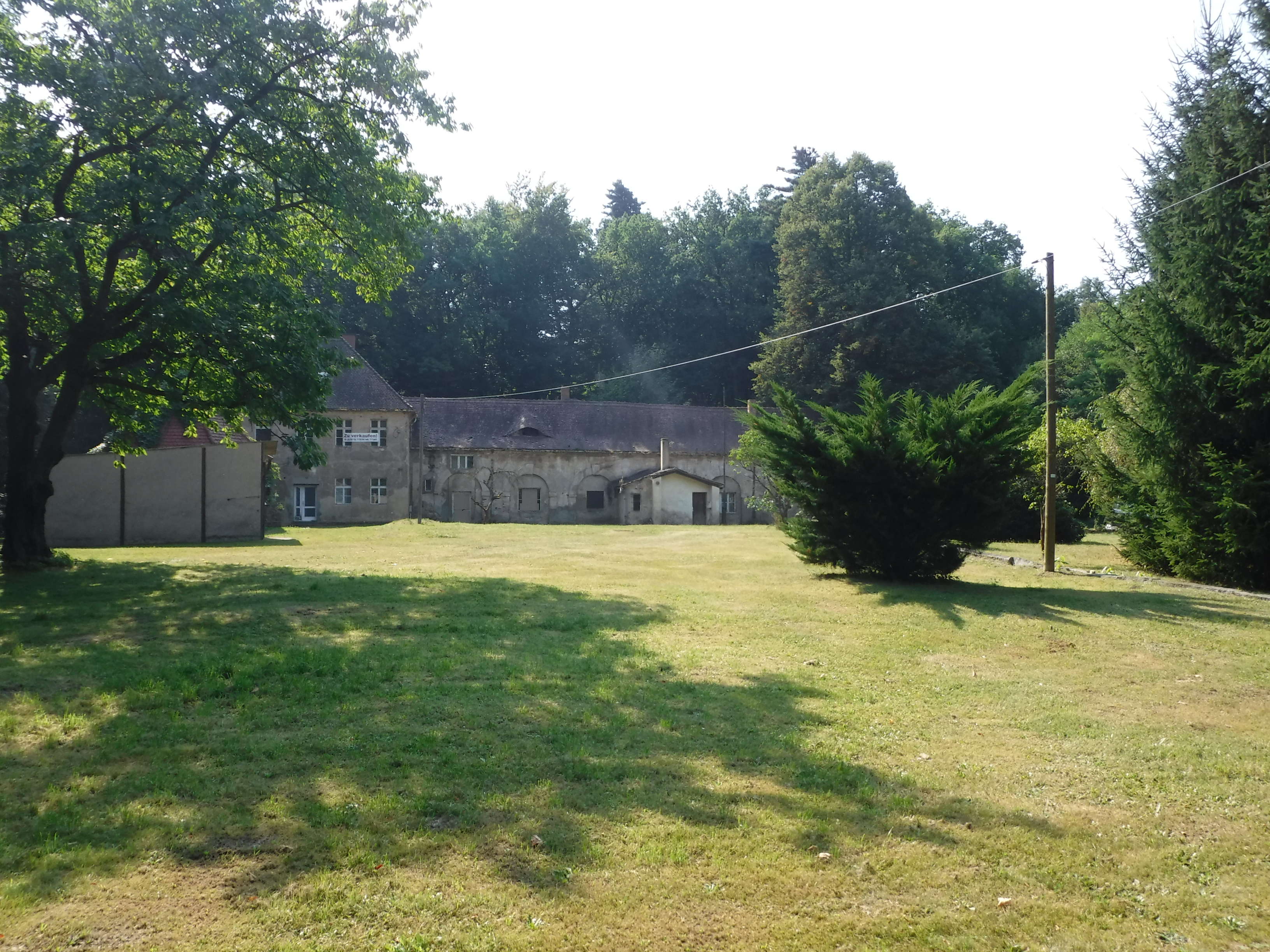 Dort, wo jetzt die Wiese ist, stand mal Schloss Guteborn. Dahinter das ehemalige Wirtschaftsgebäude.